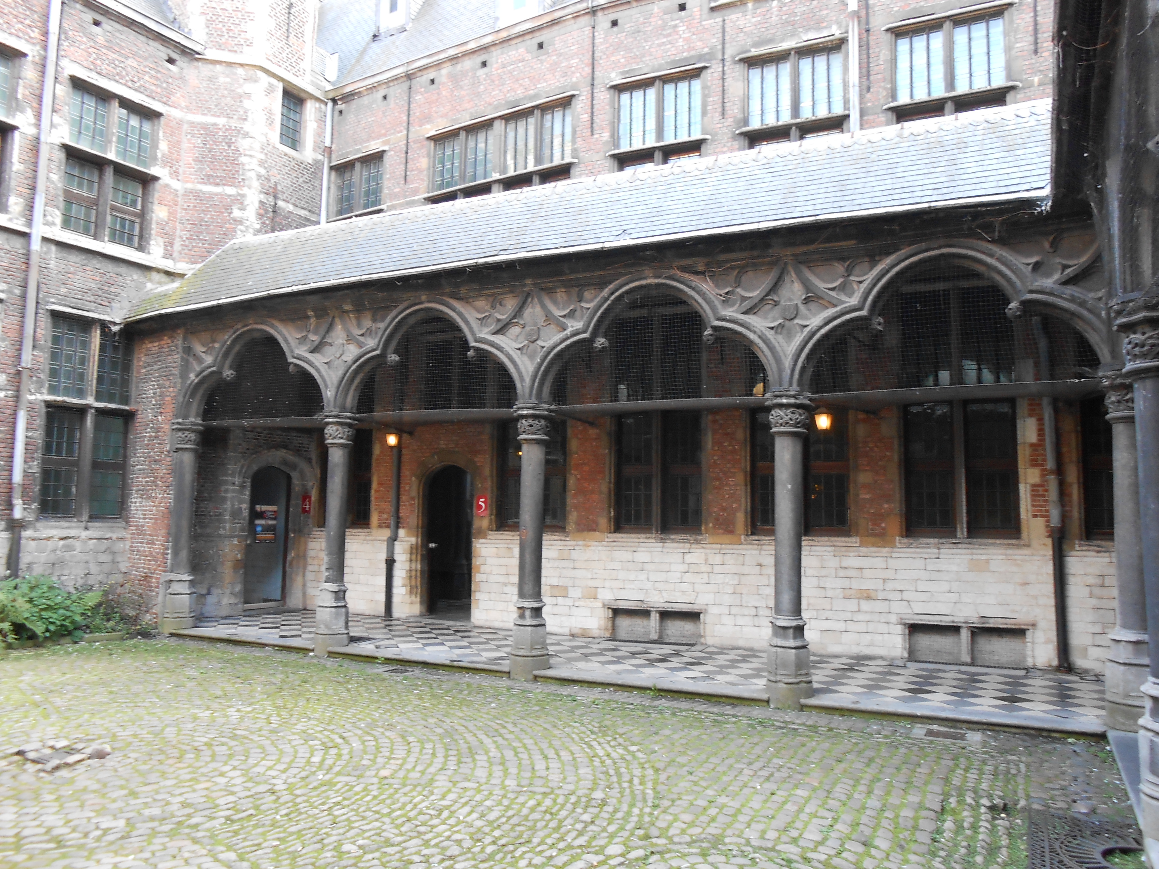 Hofstraat 15, Eertijds huis "den Rhijn" of "Oude Beurs", binnenplein